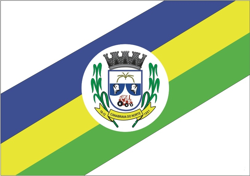 Bandeira de Canabrava do Norte Mato Grosso